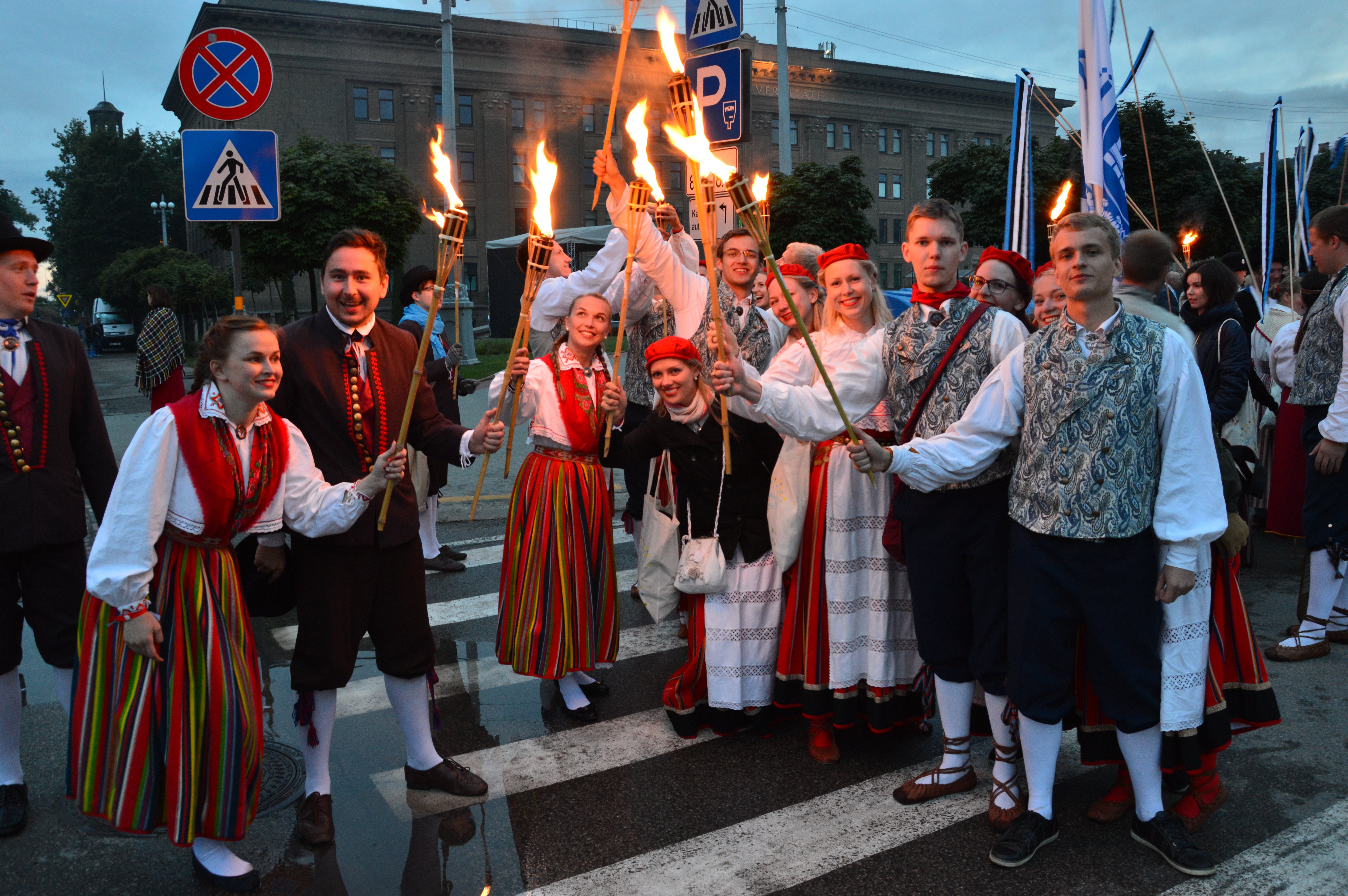 Tartu Ülikooli Rahvakunstiansambel Gaudeamusel.